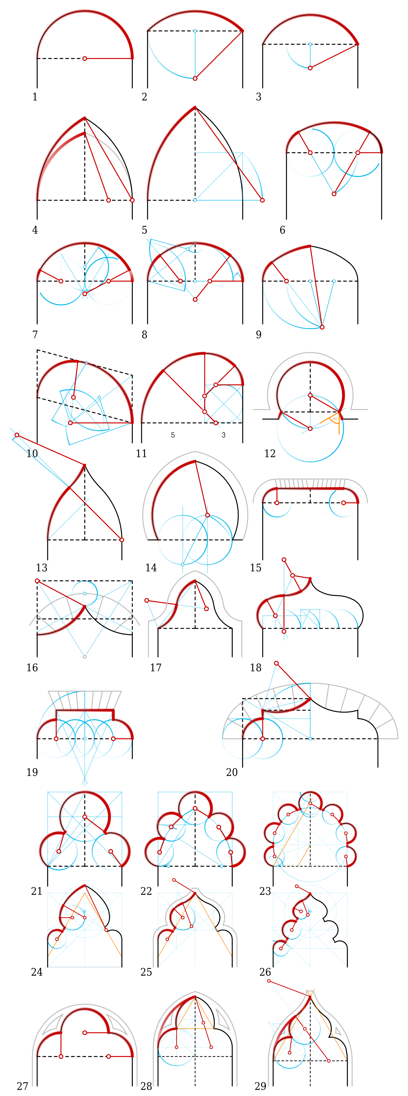 Konstruktionsskizzen für verschiedene Bogenformen